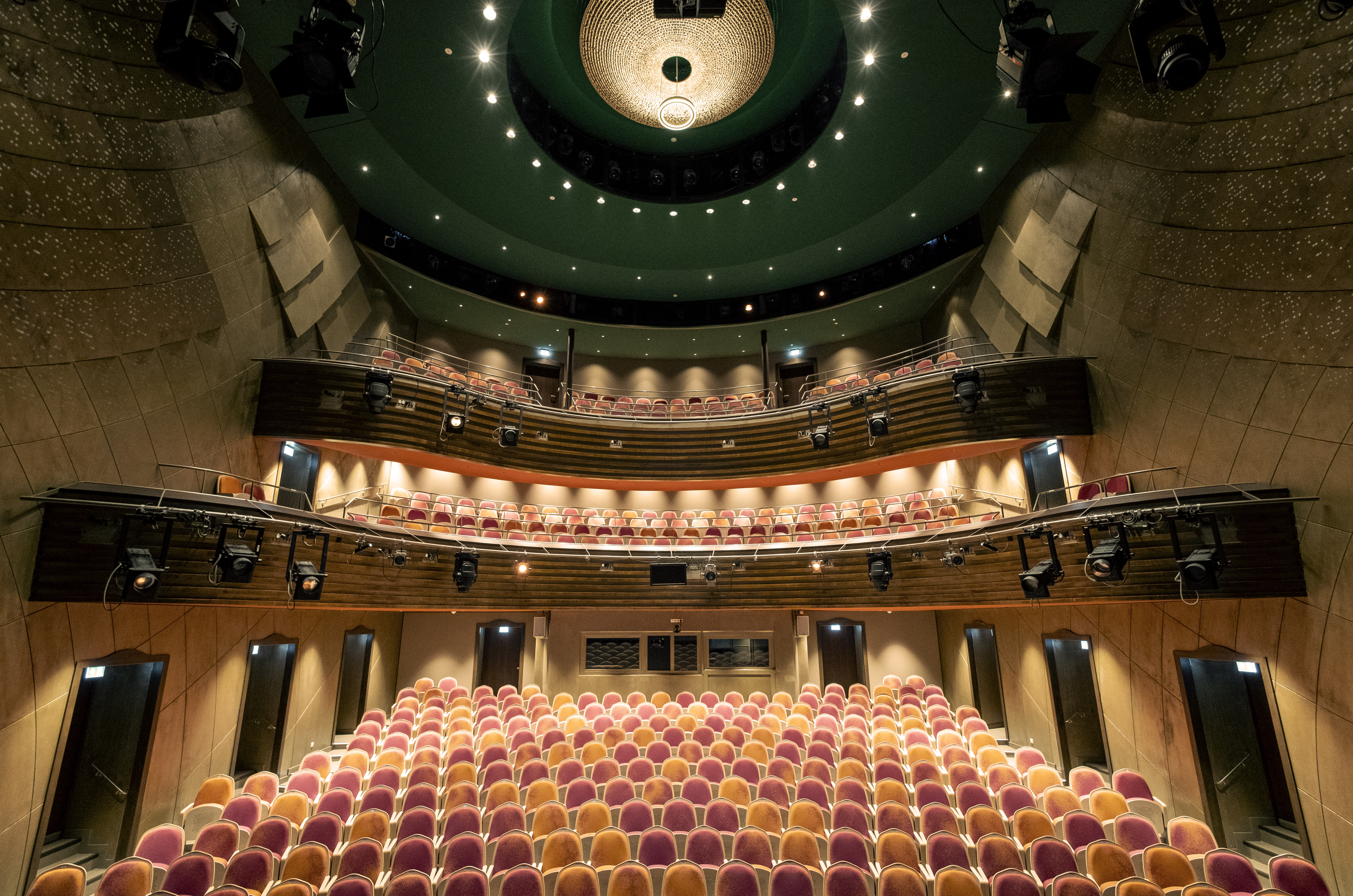 Foto: Chris Gossmann